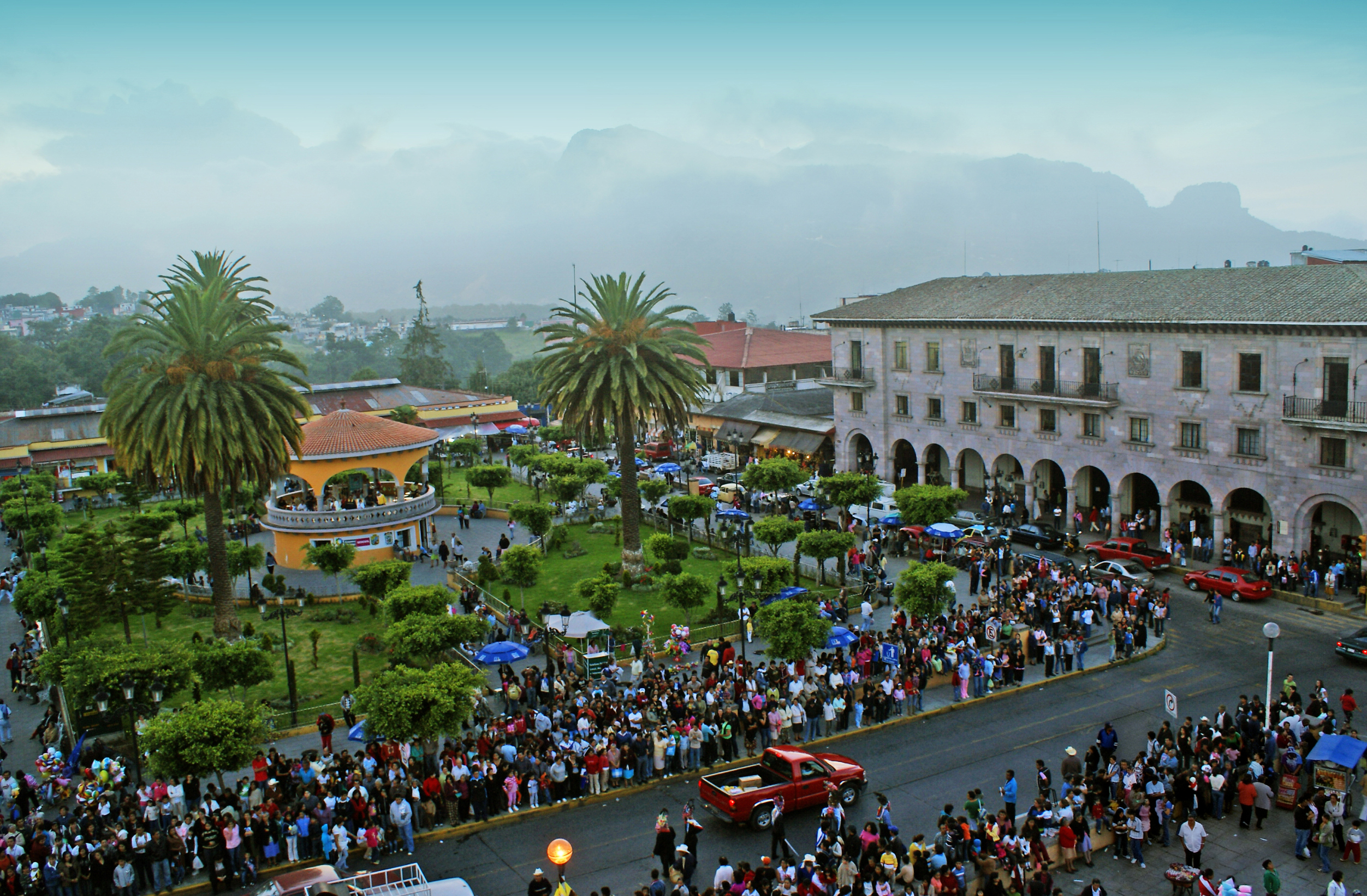 Festividades de la Virgen del Carmen Zocalo de la ciudad de Teziutlan, Puebla Mexico.